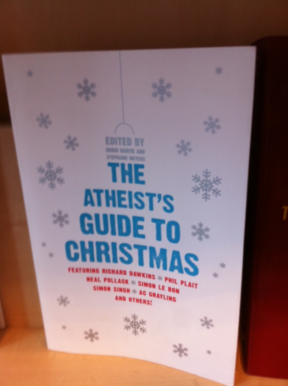 Couverture du livre